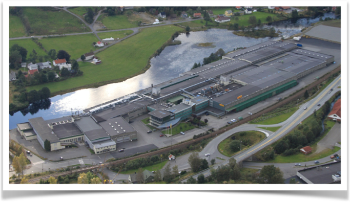 NorDans hovedfabrikk på Moi